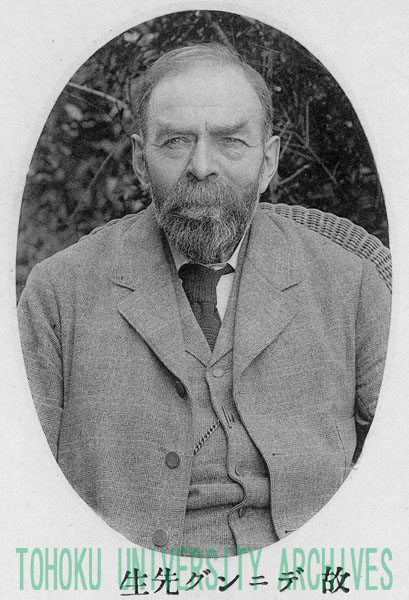 ウォルター・デニング